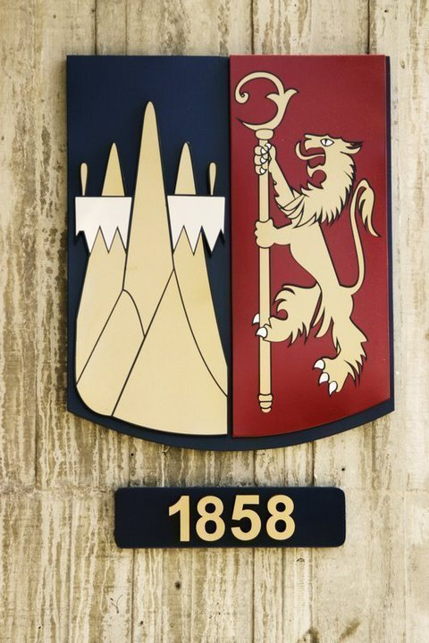 Escudo do Colégio de São Bento do Rio de Janeiro